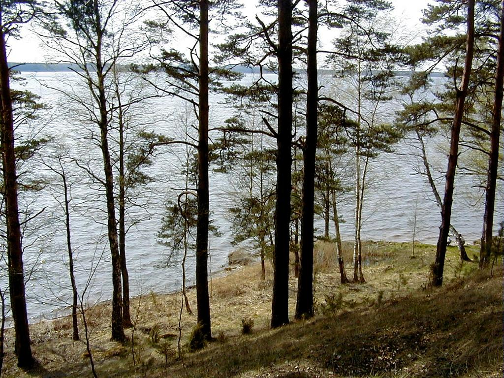 Zebras ezers 2001-05-01